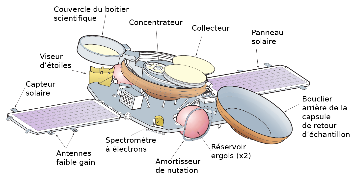 Schéma de la sonde spatiale Genesis de la NASA. Légendes en francais.